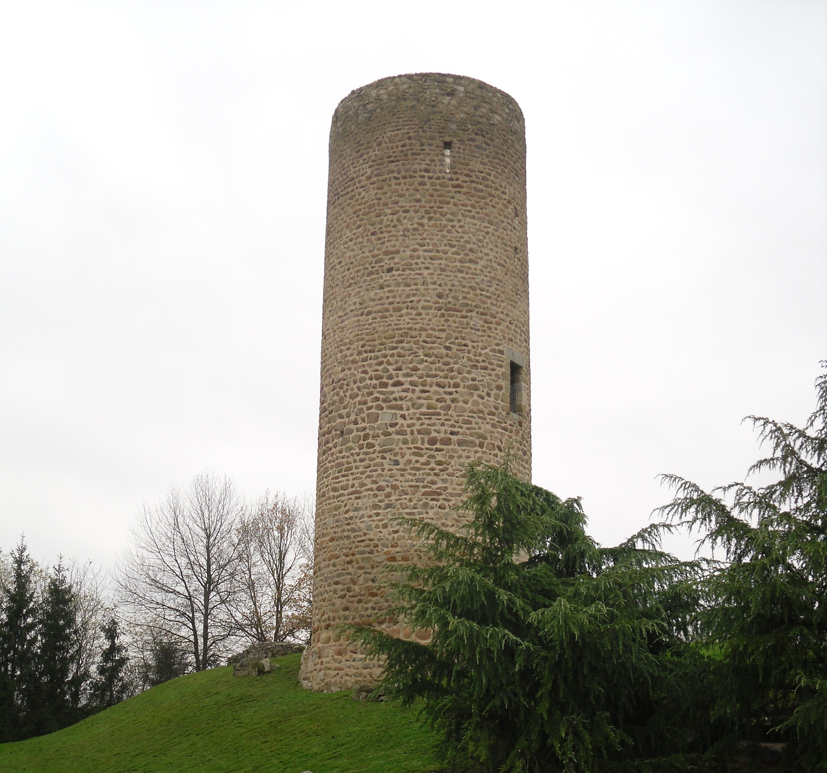 Château des comtes de Forez, à Cleppé (Loire, France) .